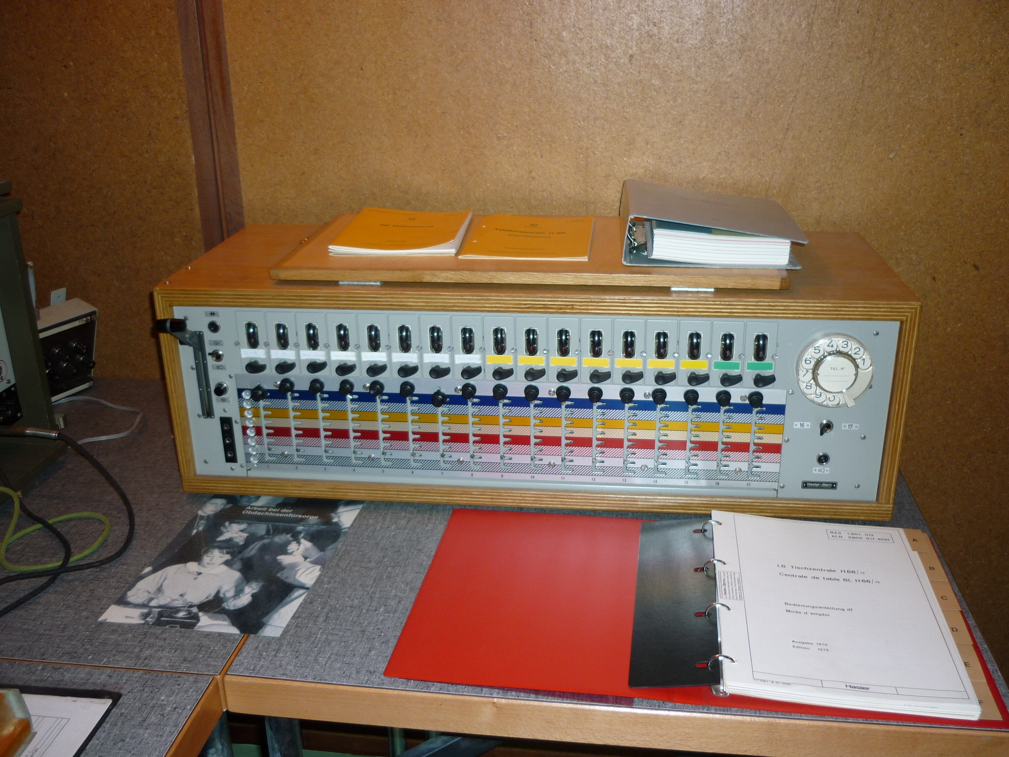 Telefonzentrale H-66, Zivilschutzmuseum, Zürich, Schweiz